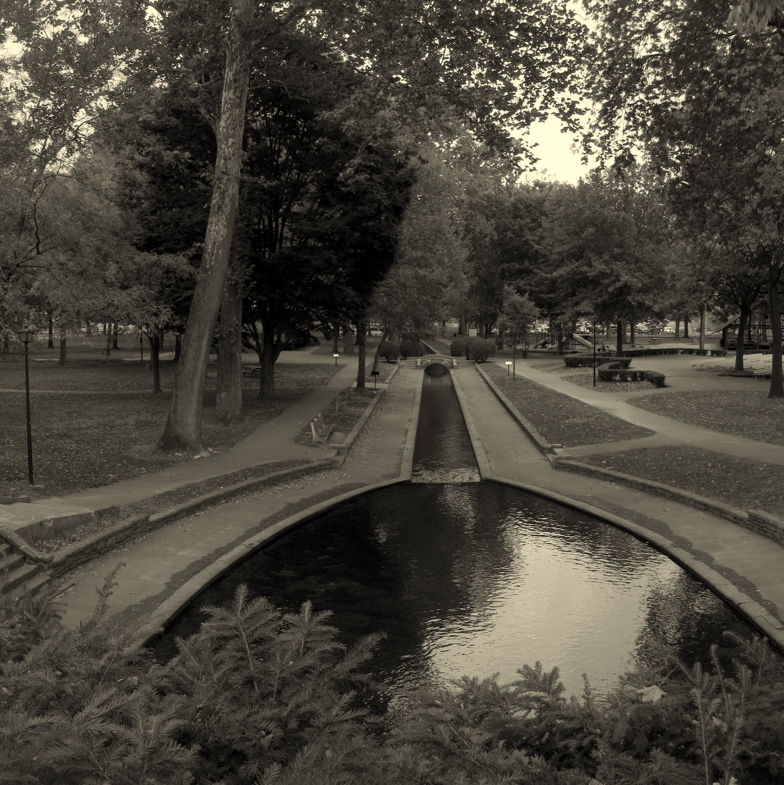 Lititz, PA 17543, USA